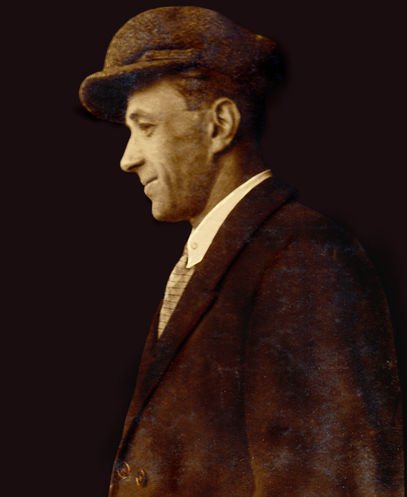 Сергей Маркин. 1930. Подпись: "Марусе от уже не такой тёмной личности!"